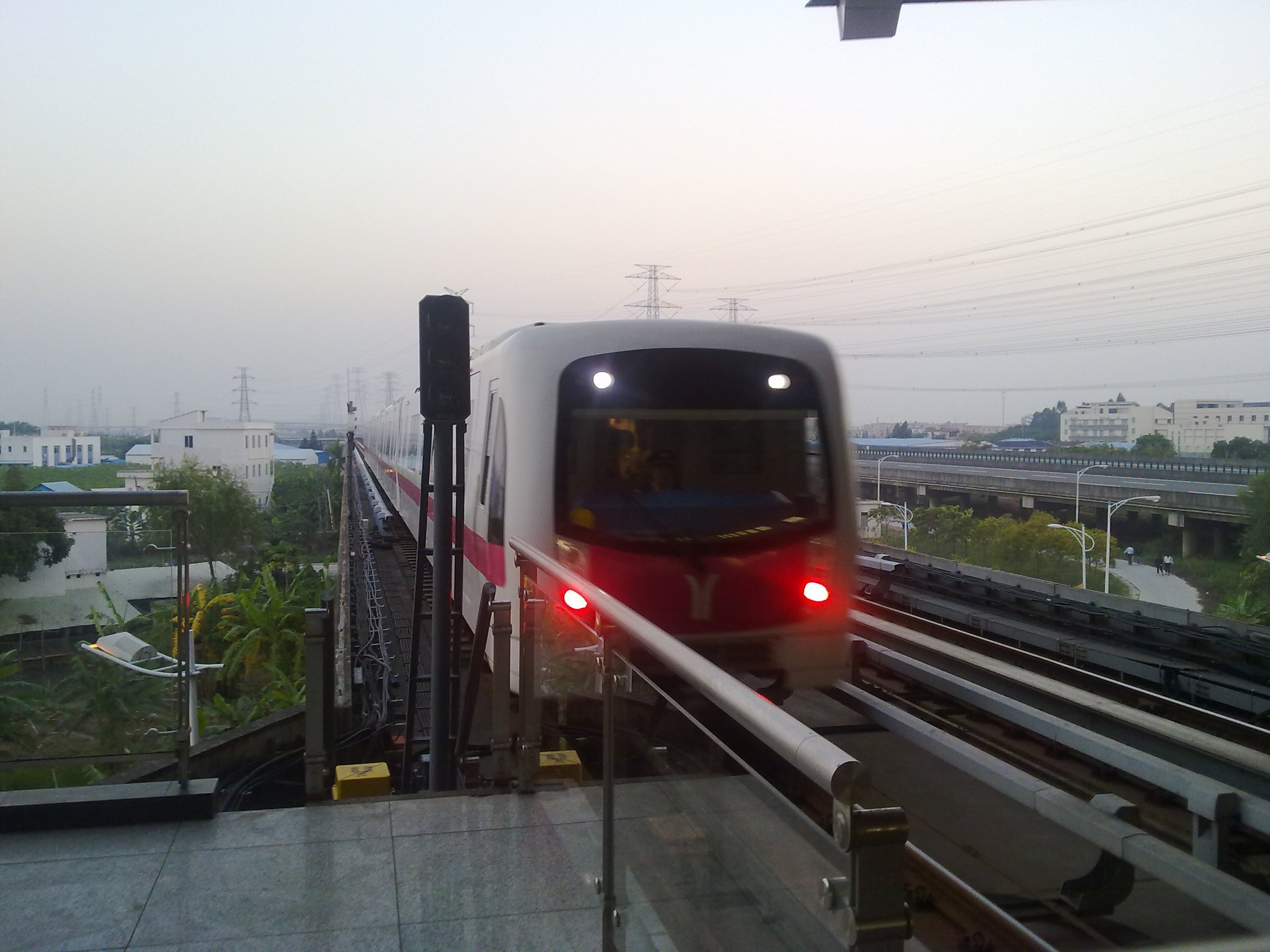 廣州地鐵四號線列車